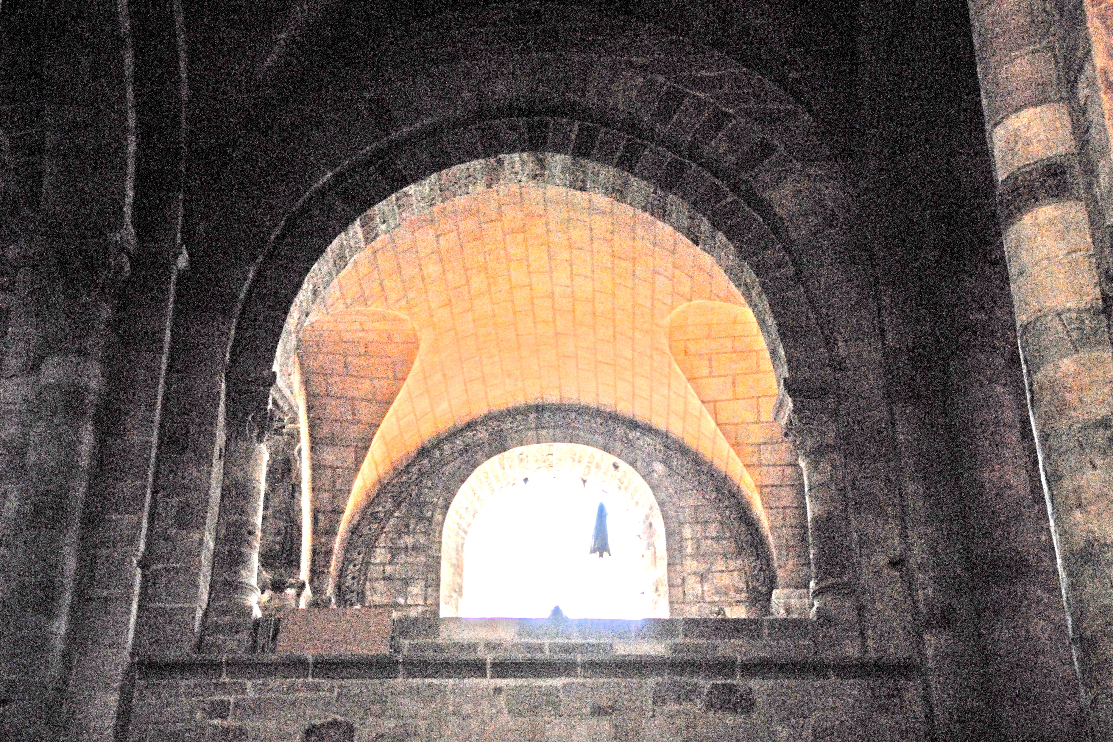 St.-Julien Brioude, Obergeschoss So-Vorhalle